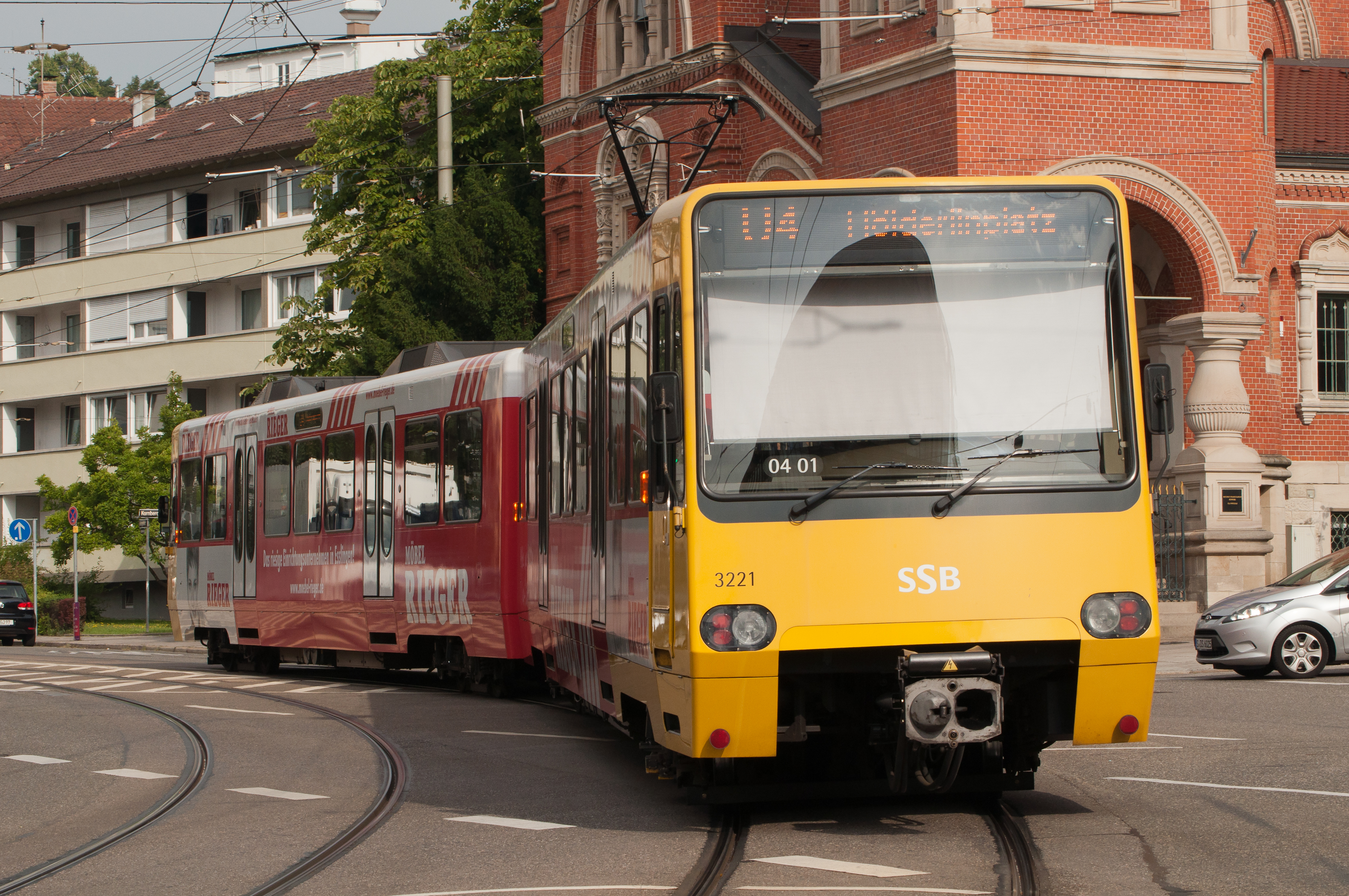 U-Bahn Linie 4 in Richtung Hölderlinplatz in der Nähe der Russischen Kirche in Stuttgart.